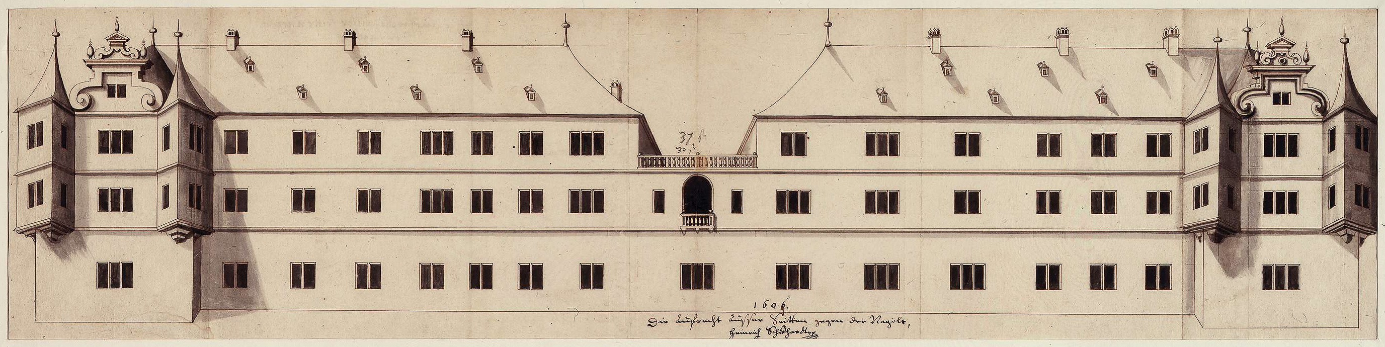 Entwurf Schloss Calw, Ansicht der äußeren Schlossseite